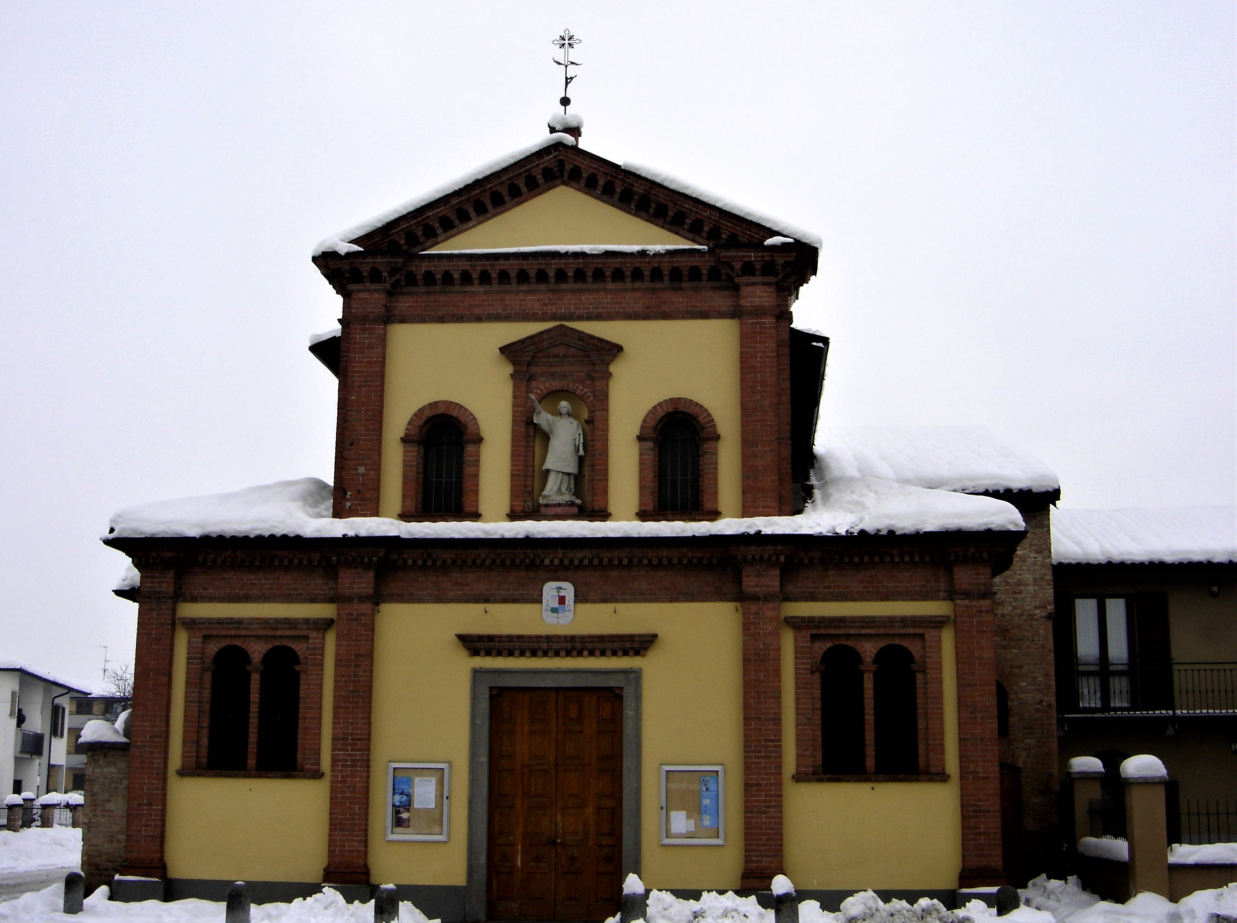 Suggestiva mmagine invernale della Chiesa di San Lorenzo in Sola